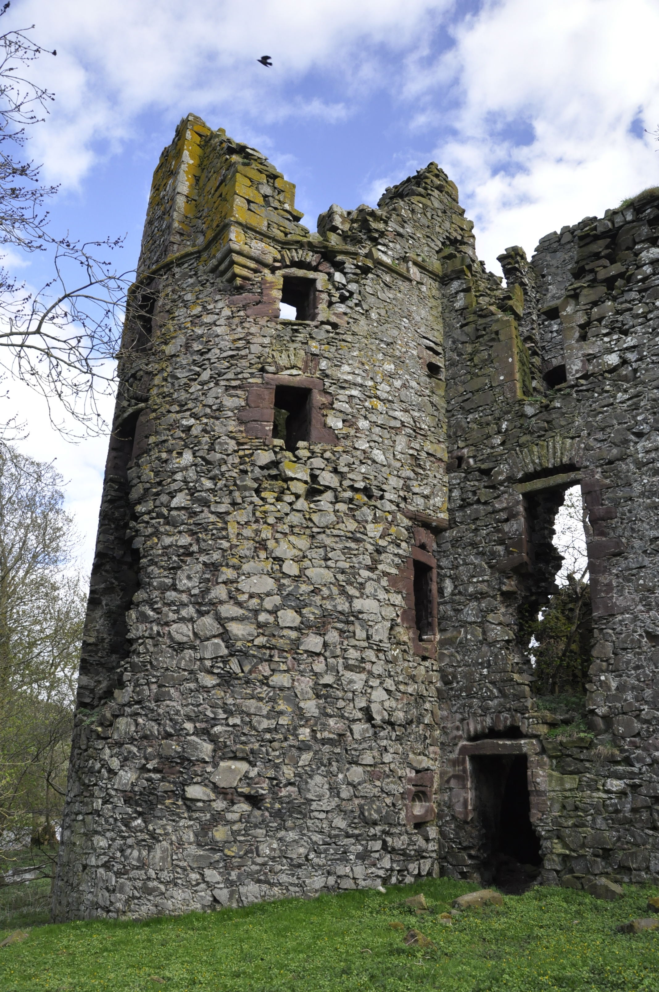 Ruïne van Drochil Castle bij West Linton, Schotland